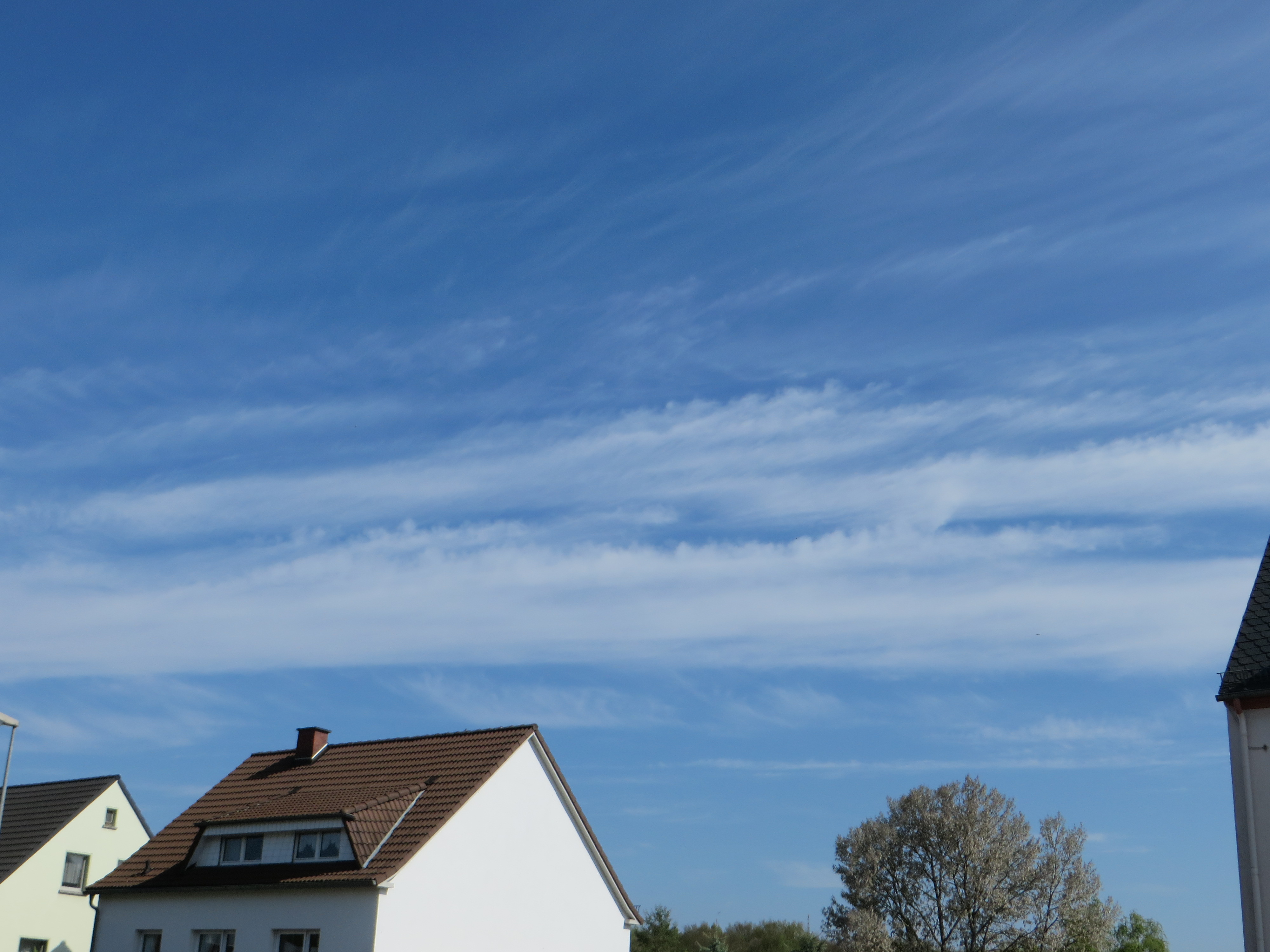 Cirrus mit Türmchen an der Oberseite. Gesehen bei Limburg am 6. Mai 2017